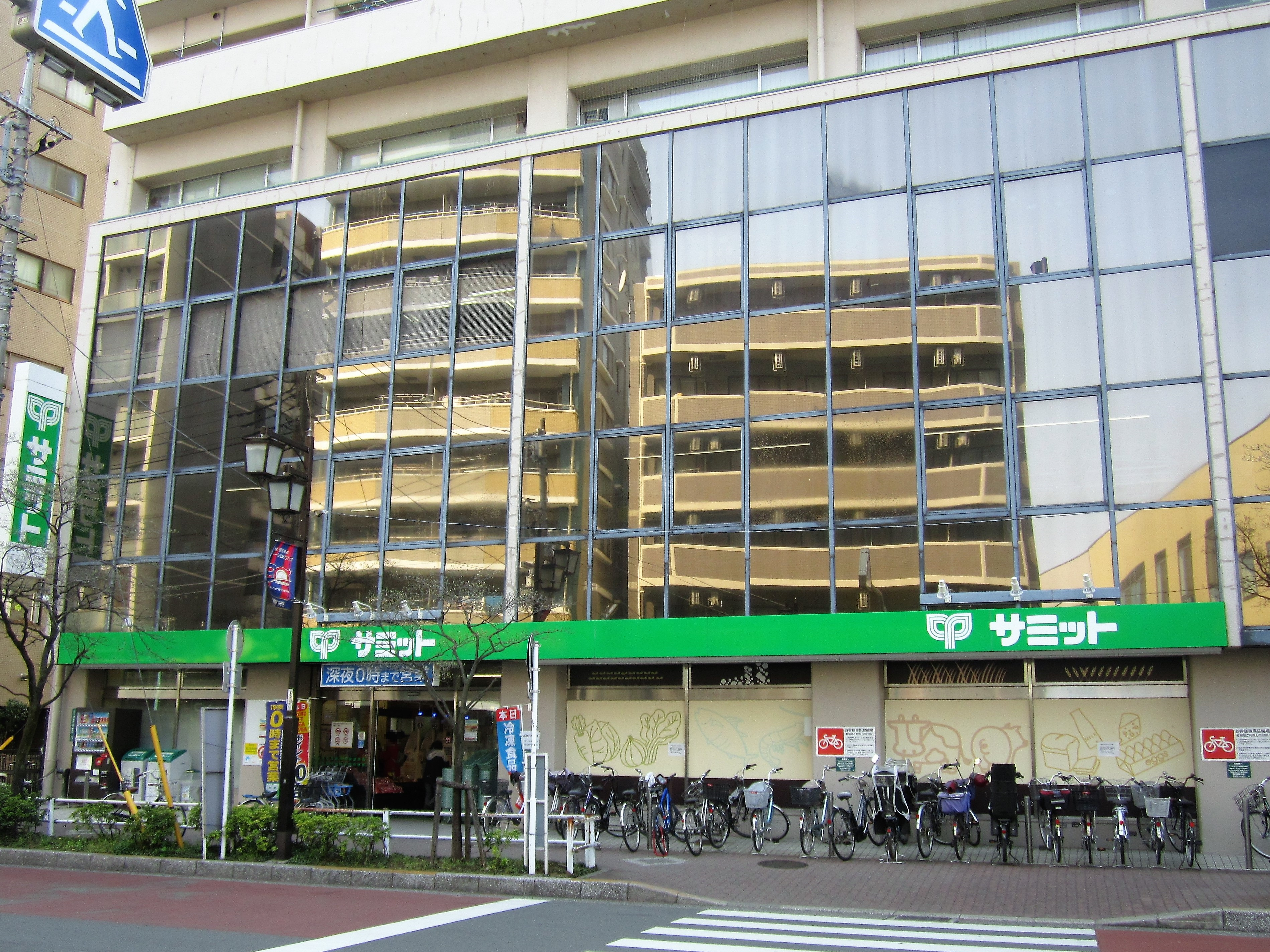 サミットストア東府中店（府中市清水ケ丘） Canon PowerShot A2200